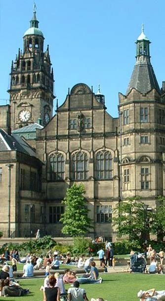 Sheffield Town Hall (Rathaus) mit den davor gelegenen Peace Gardens